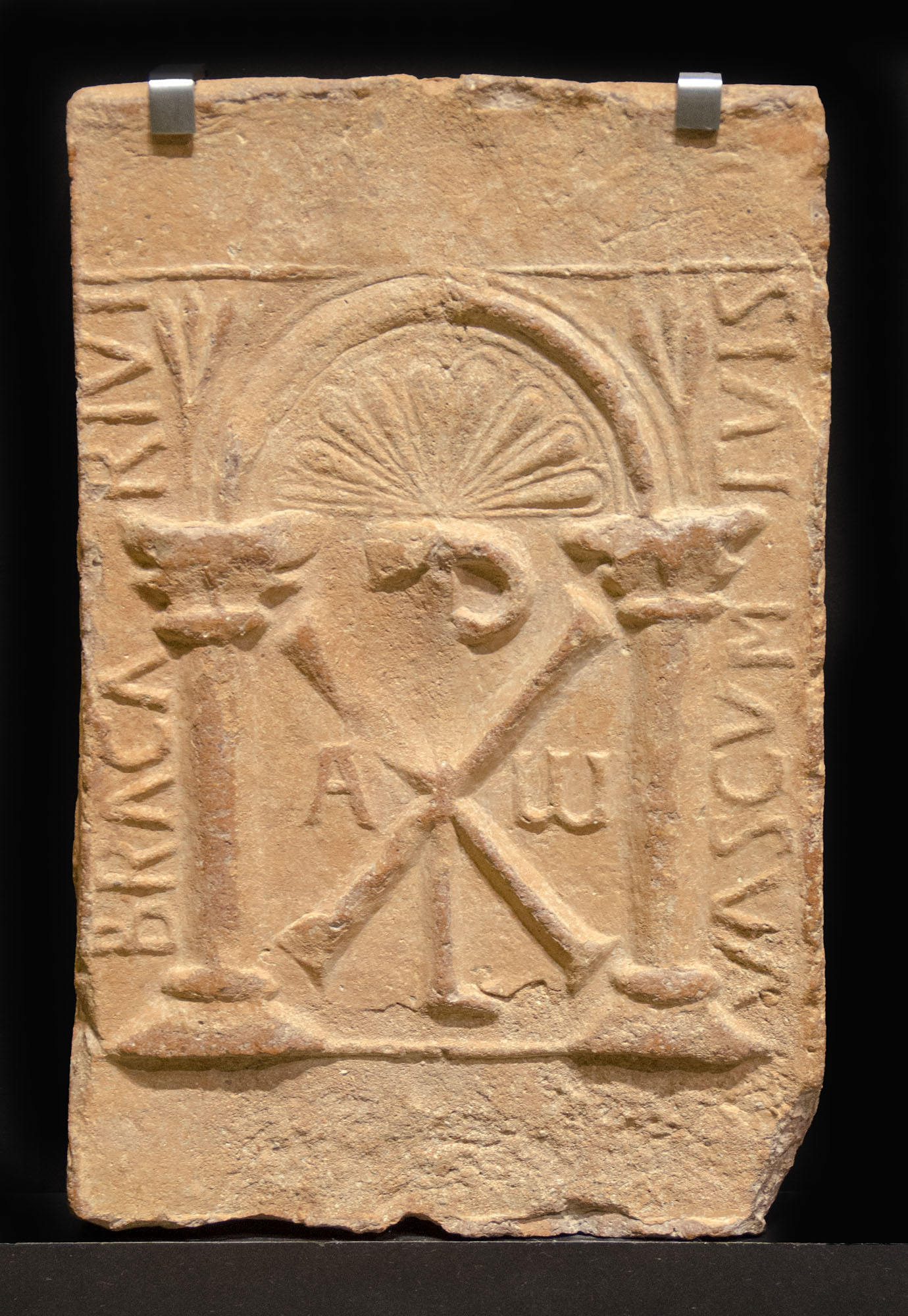 Placa o ladrillo de barro cocido y origen desconocido. Museo Arqueológico de Córdoba (España).